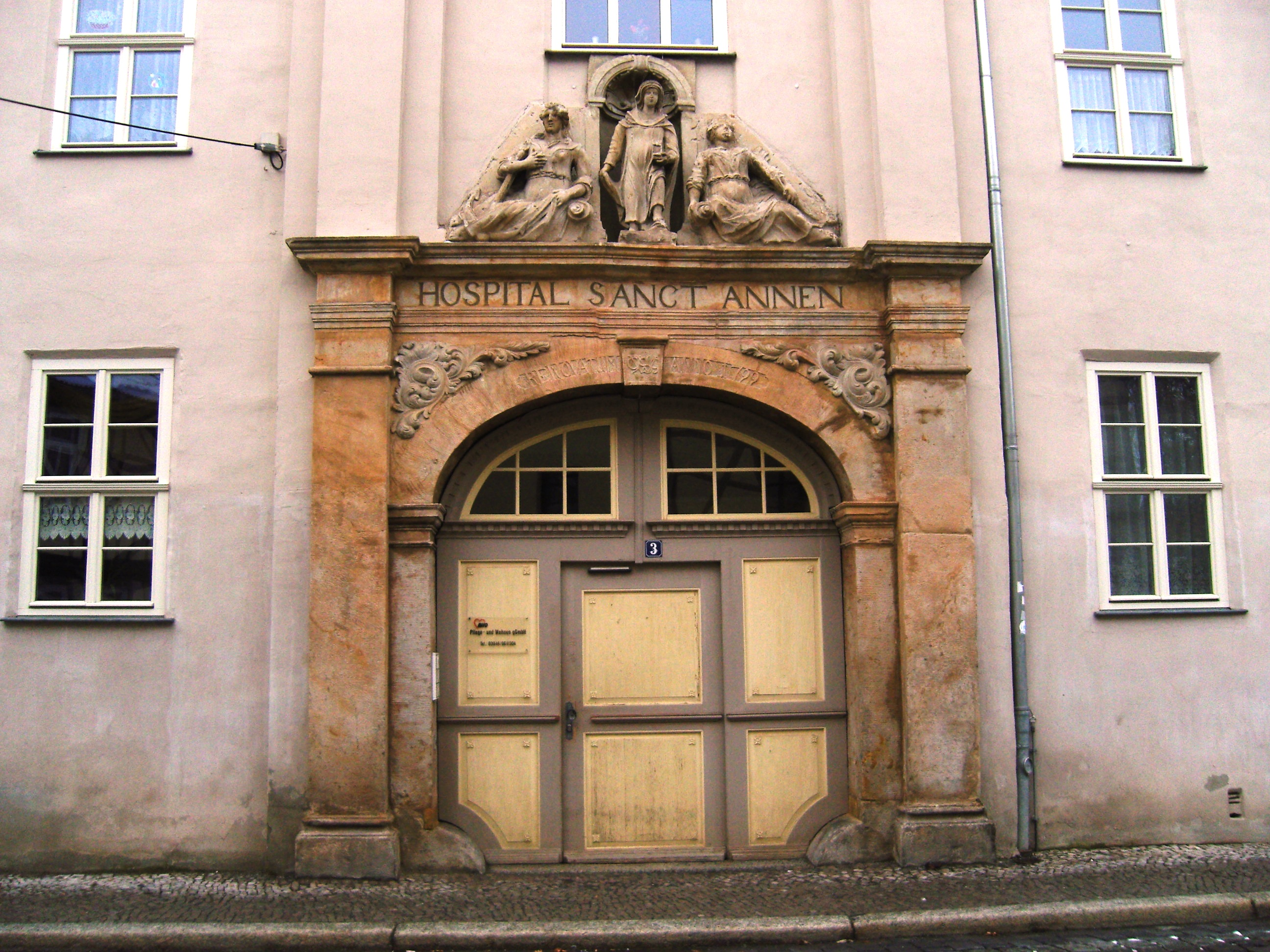 Tür des denkmalgeschützten Haus Zwischen den Städten in Quedlinburg